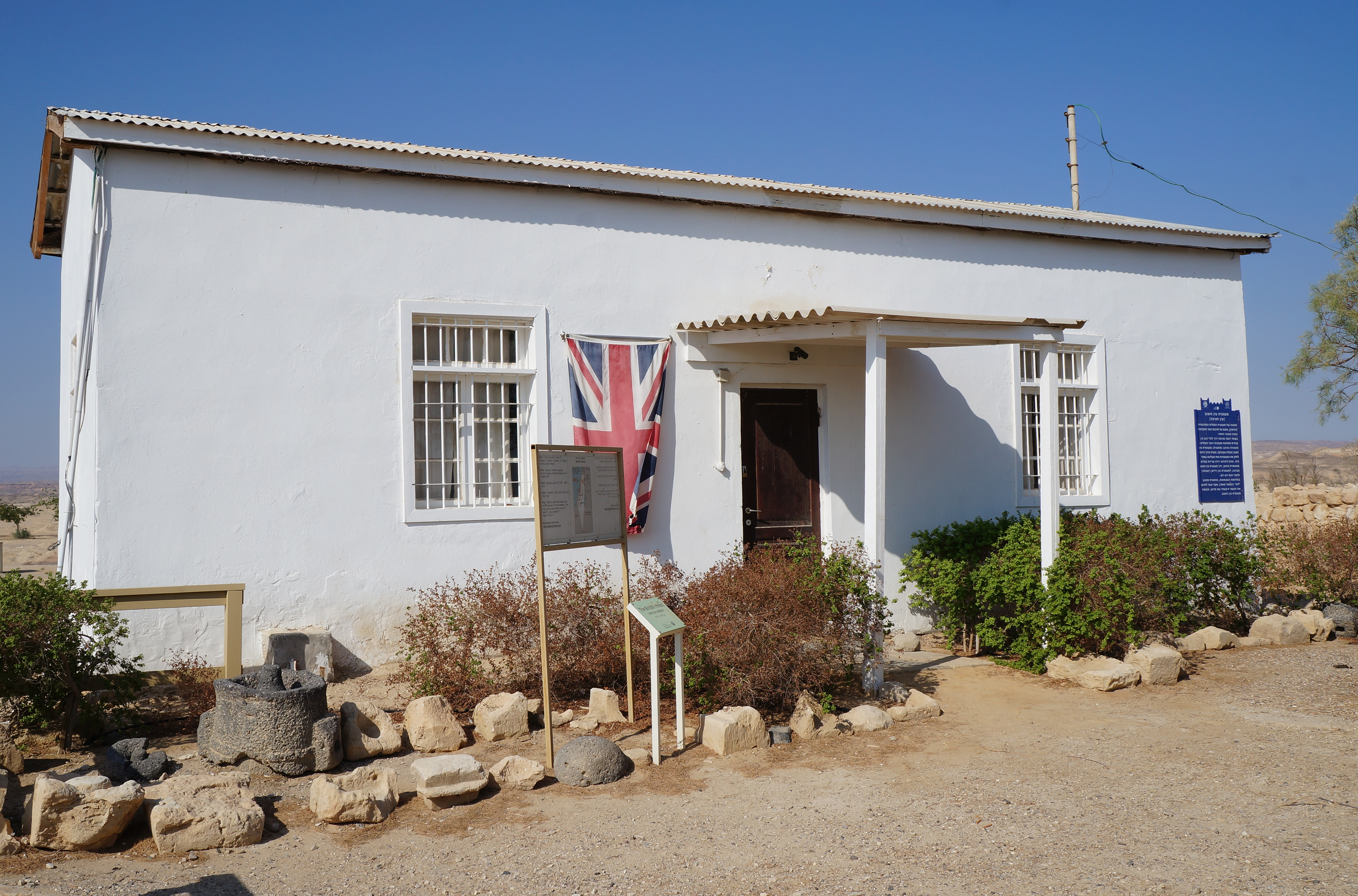 מבנה משטרה מתקופת המנדט הבריטי באזור עין חצבה